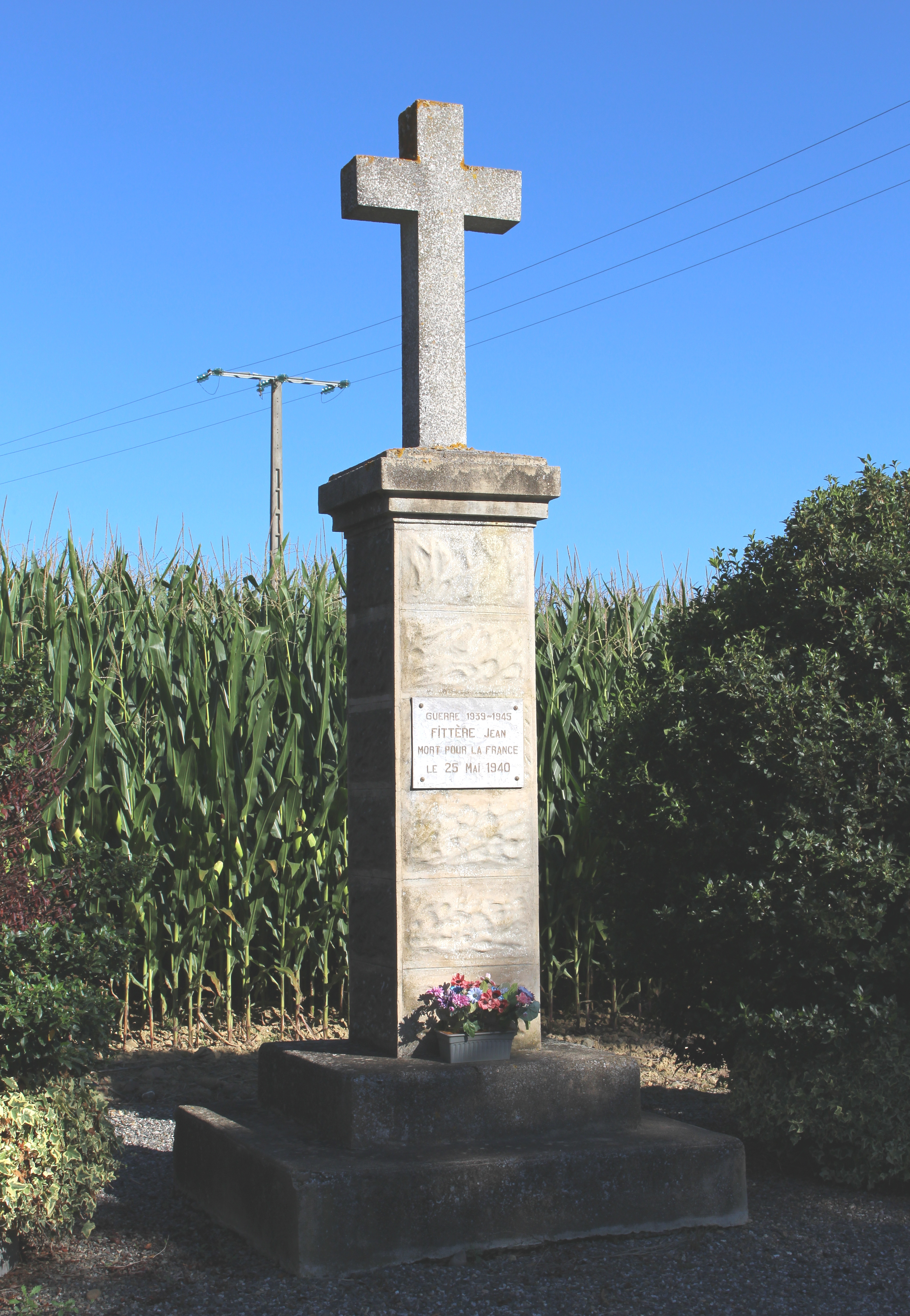 Monument aux morts de Barthe (Hautes-Pyrénées)